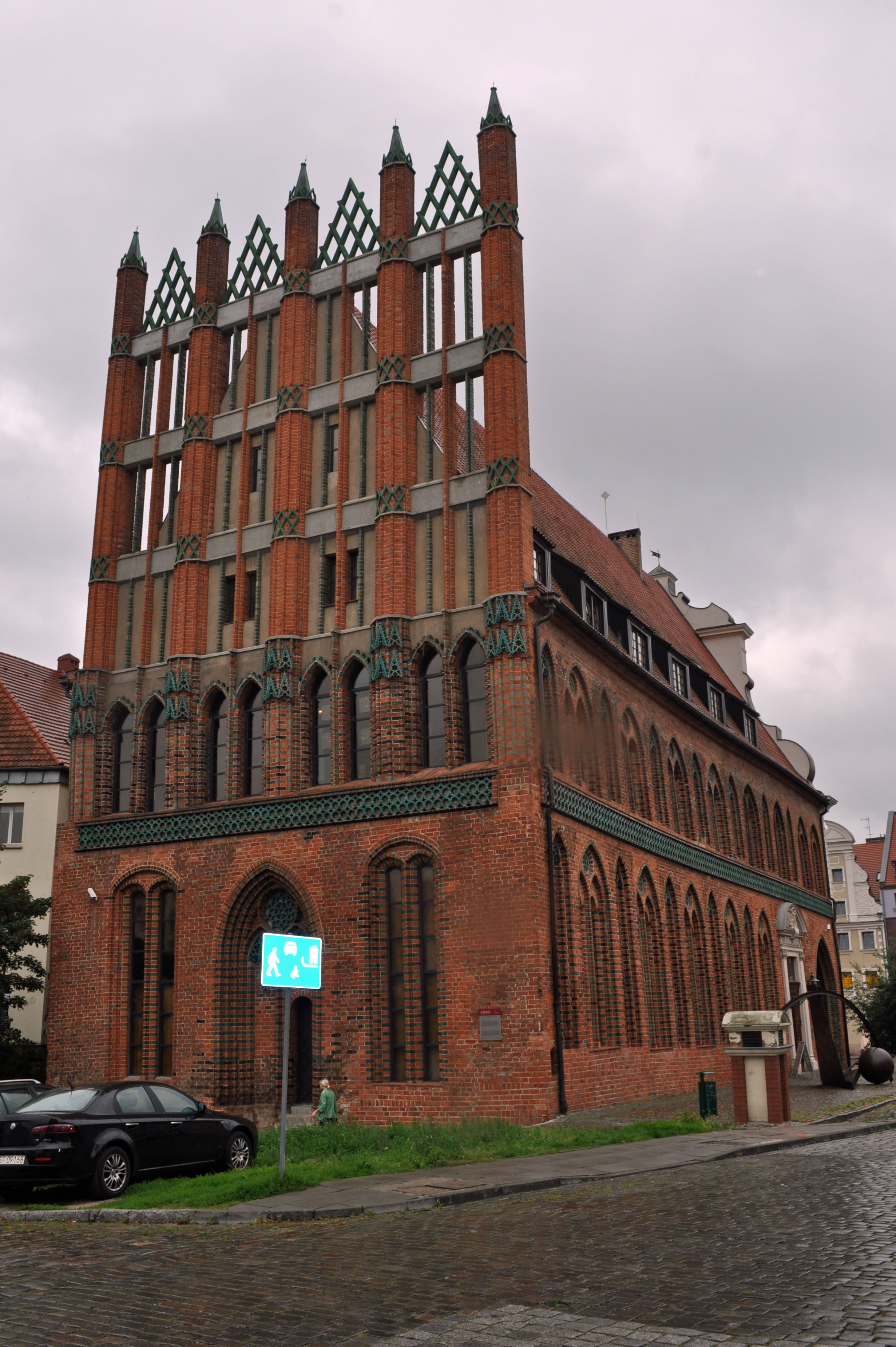 Szczecin - Stary Ratusz siehe Dateiname